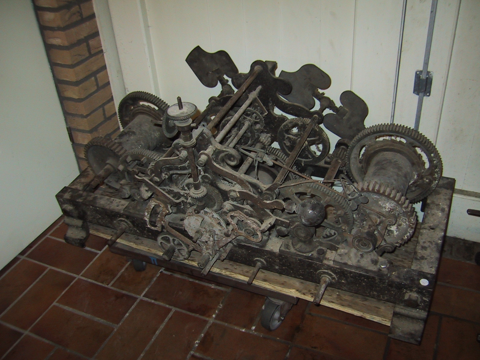 Torenuurwerk in slechte staat. Voor renovatie